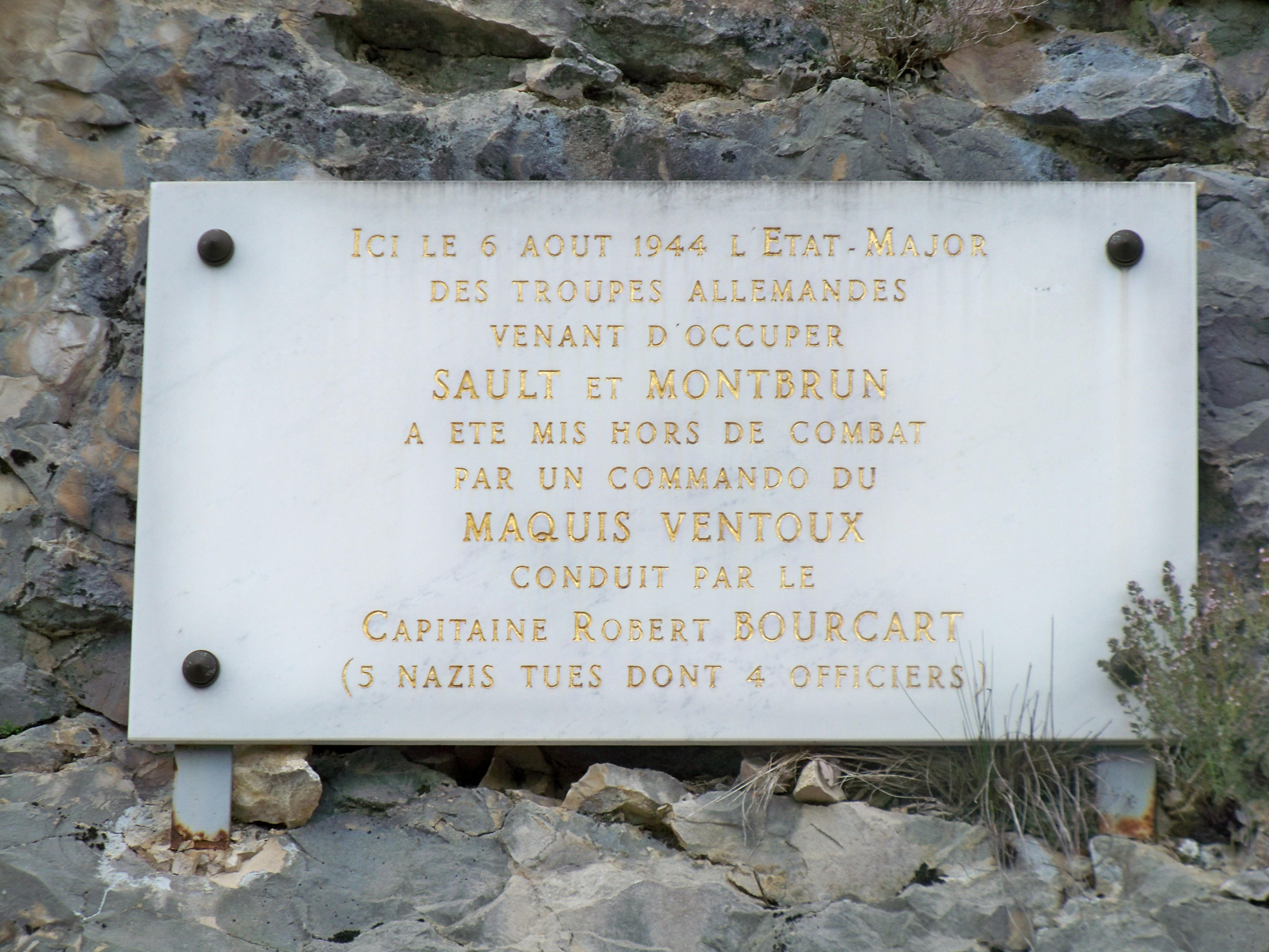 Plaque commémorative de combat du Maquis Ventoux, commandé par Robert Boucart, face à l'armée allemande, le 6 aout 1944 (au nord de Saint Saturnin lès Apt).